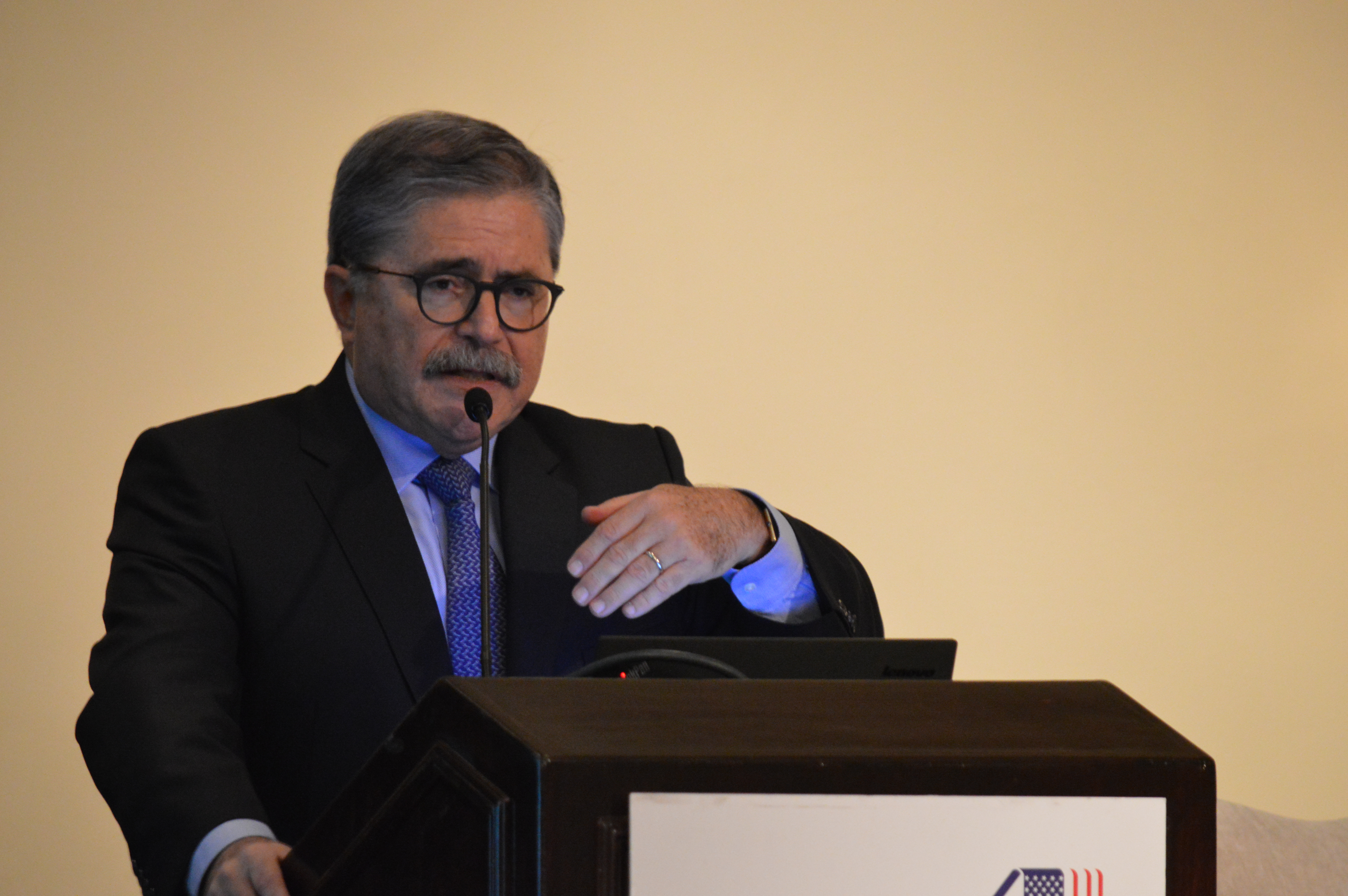 Juan Diego Castro, candidato a la presidencia de Costa Rica para las elecciones del 2018.